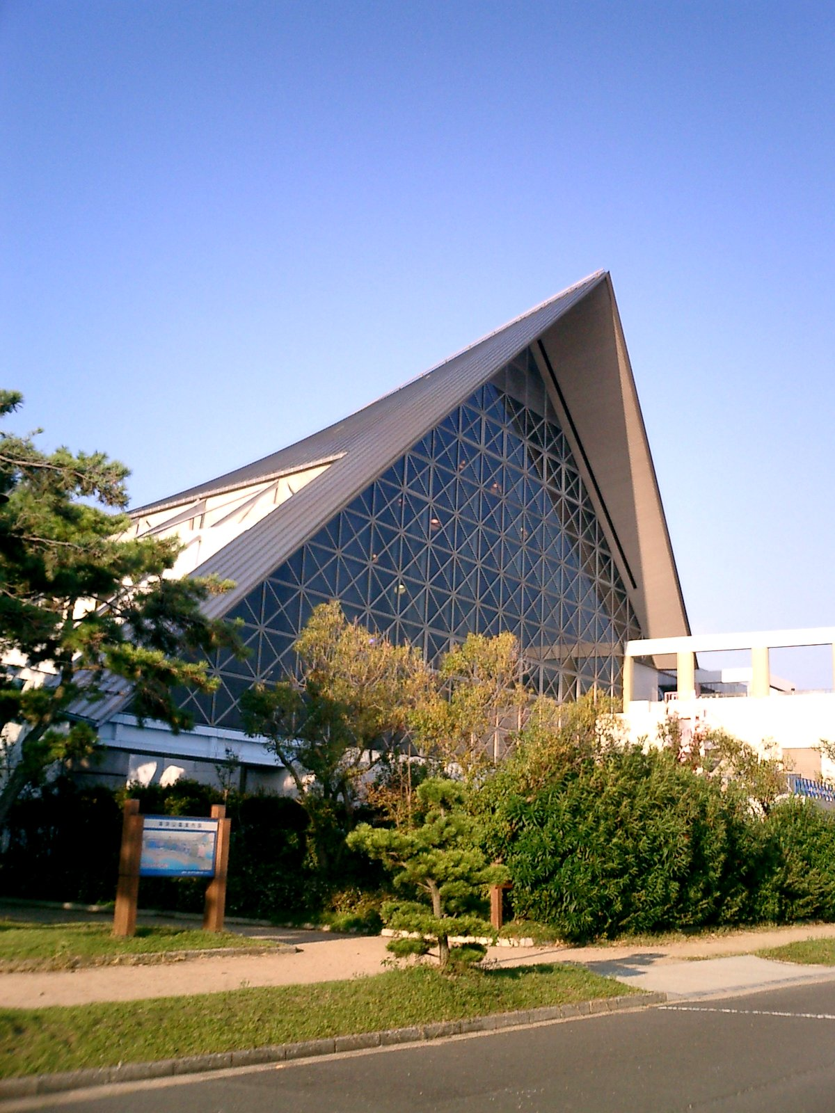 Suma_aqualife_park_in_Kobe